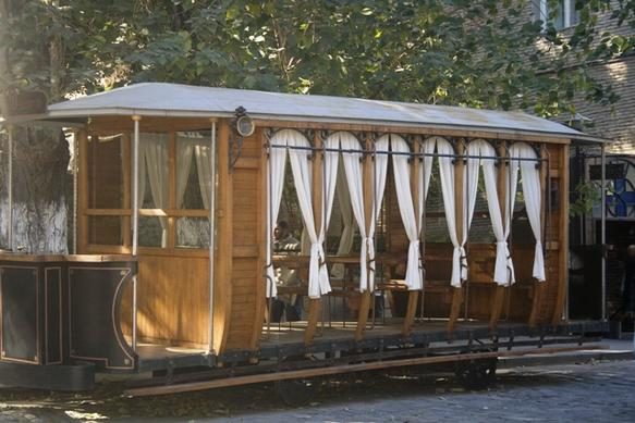 konka old tramway in Tbilisi, Georgia